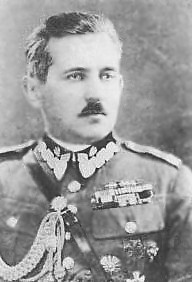 General Stanisław Bułak-Bałachowicz, officer of Polish Army, d.1940